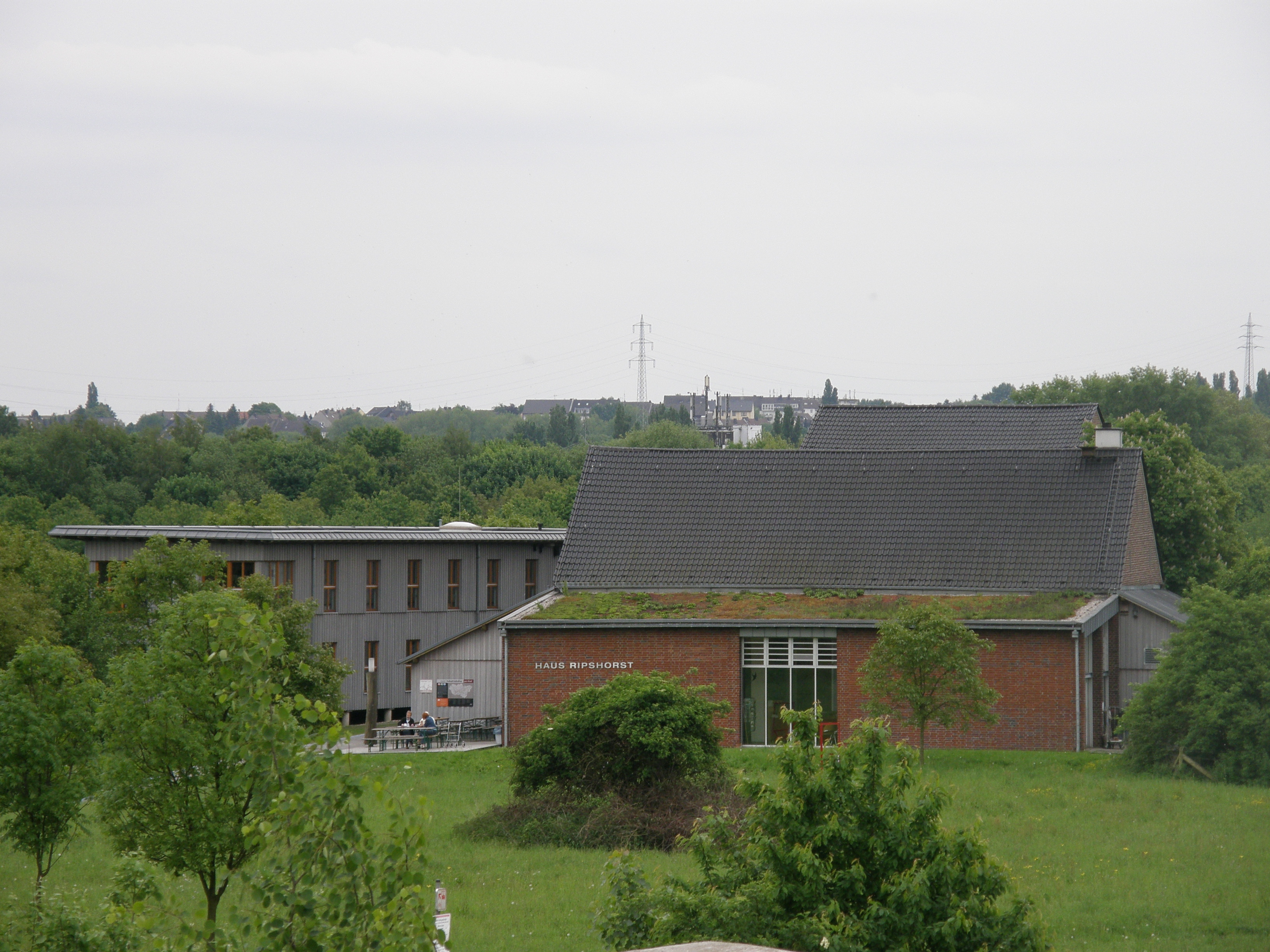 Haus Ripshorst , Ansicht von der Kanalbrücke aus